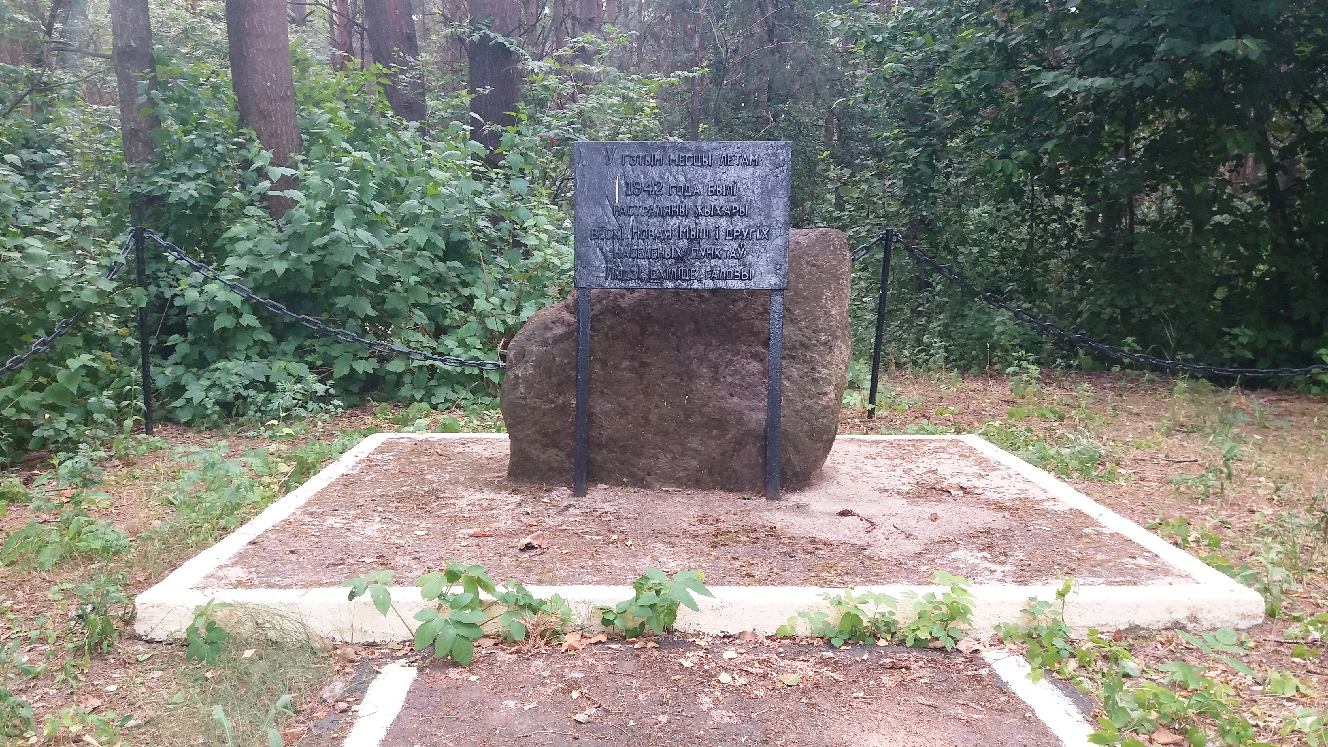 Памятник на месте расстрела евреев из гетто в деревне Новая Мышь Барановичского района. Находится в двух километрах к северо-востоку от деревни на обочине дороги на деревню Козлякевичи Новомышского сельсовета. Надпись на памятнике на белорусском языке: «У гэтым месцы летам 1942 года фашысцкiмi захопнiками былi растраляны мiрныя жыхары вескi Новая Мыш i другiх прылягаючых населеных пунктаў. Людзi, схiлiце галовы.»